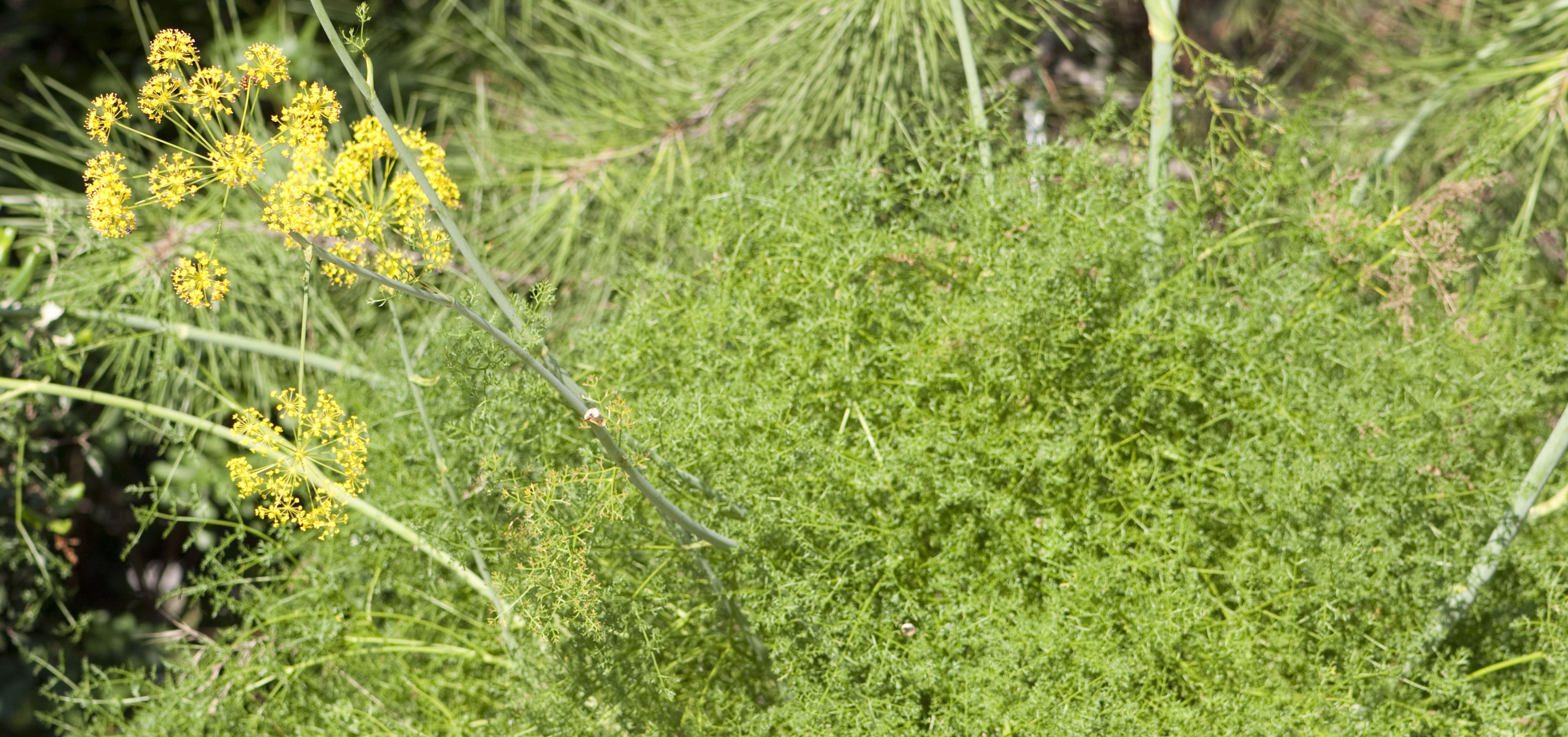 Distichoselinum tenuifolium al Jardí Botànic de Barcelona.